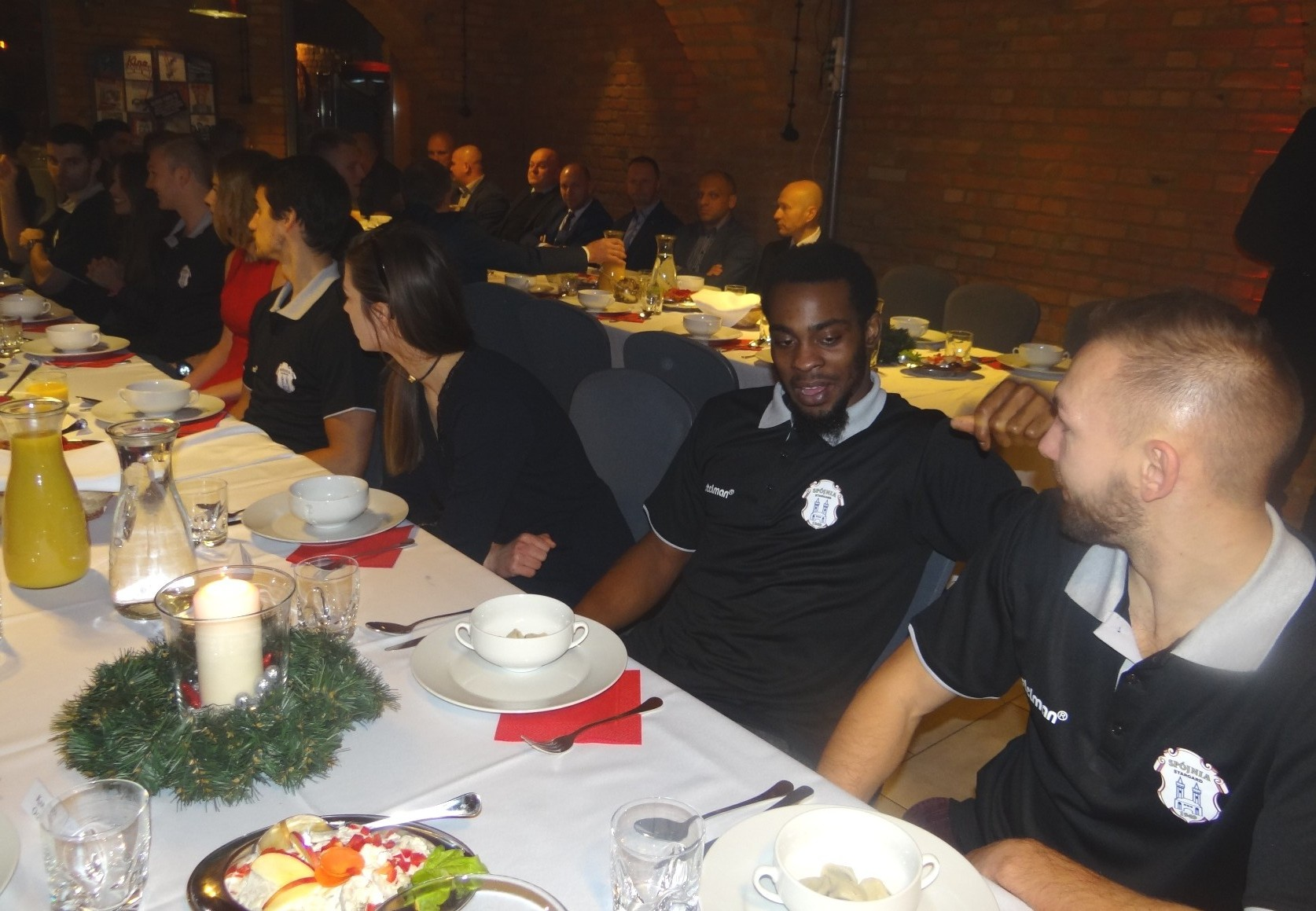 Wigilia w Spójnia (20.12.2018)